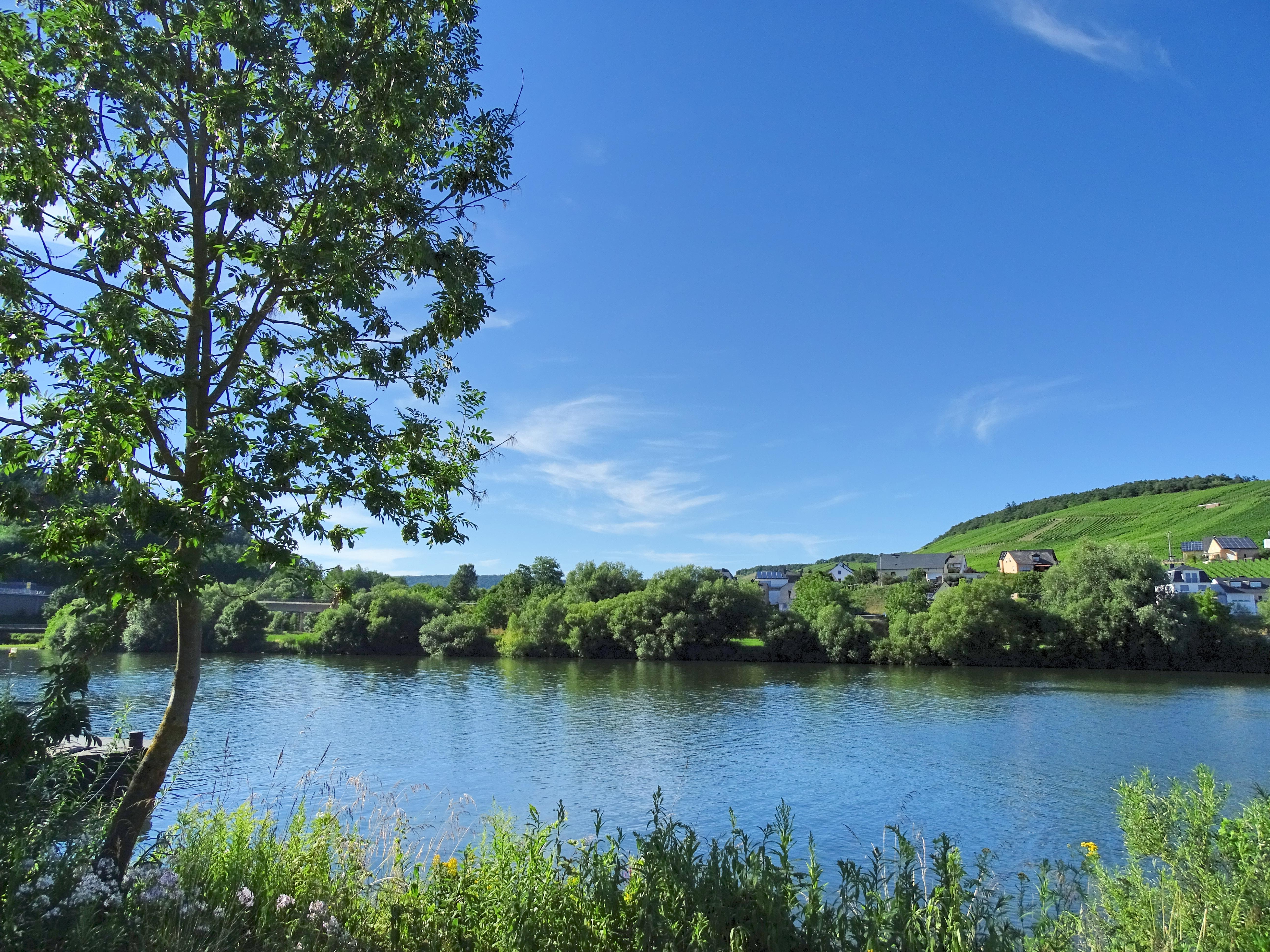 Mülheim (Moselle), Germany